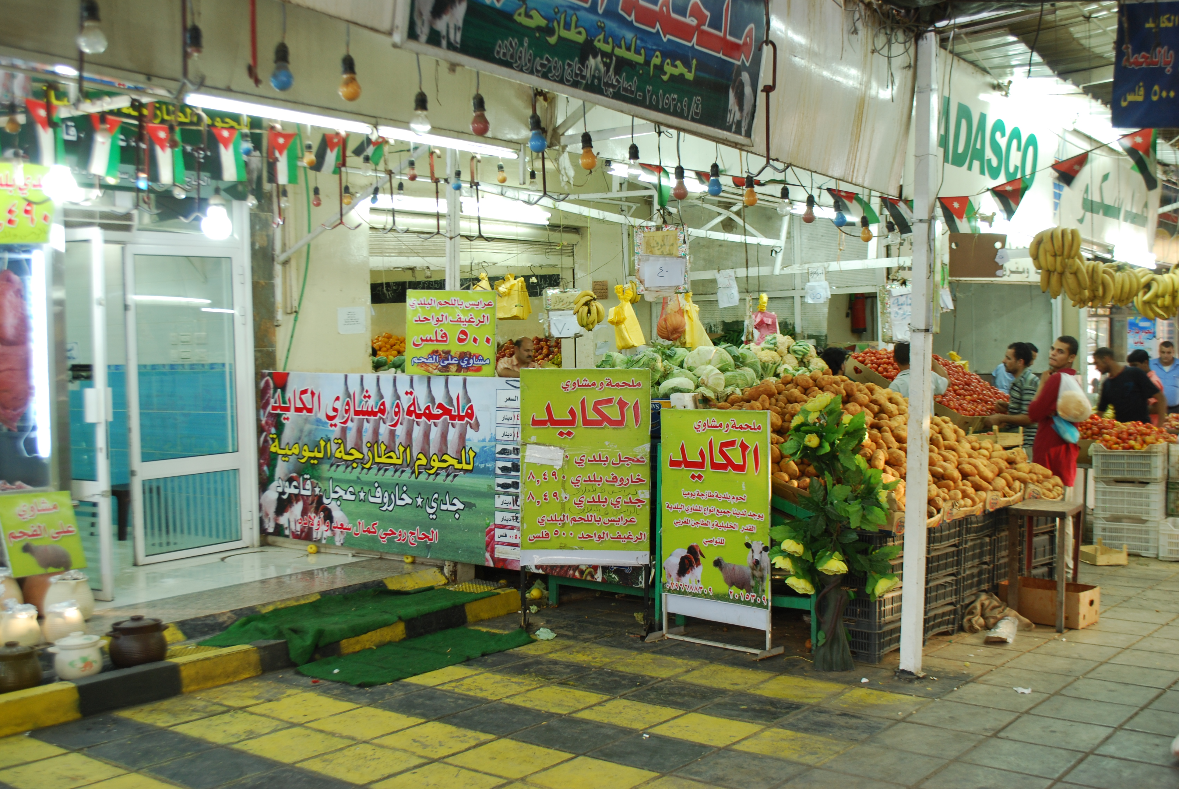 Aqaba : le quartier commerçant près du boulevard côtier.